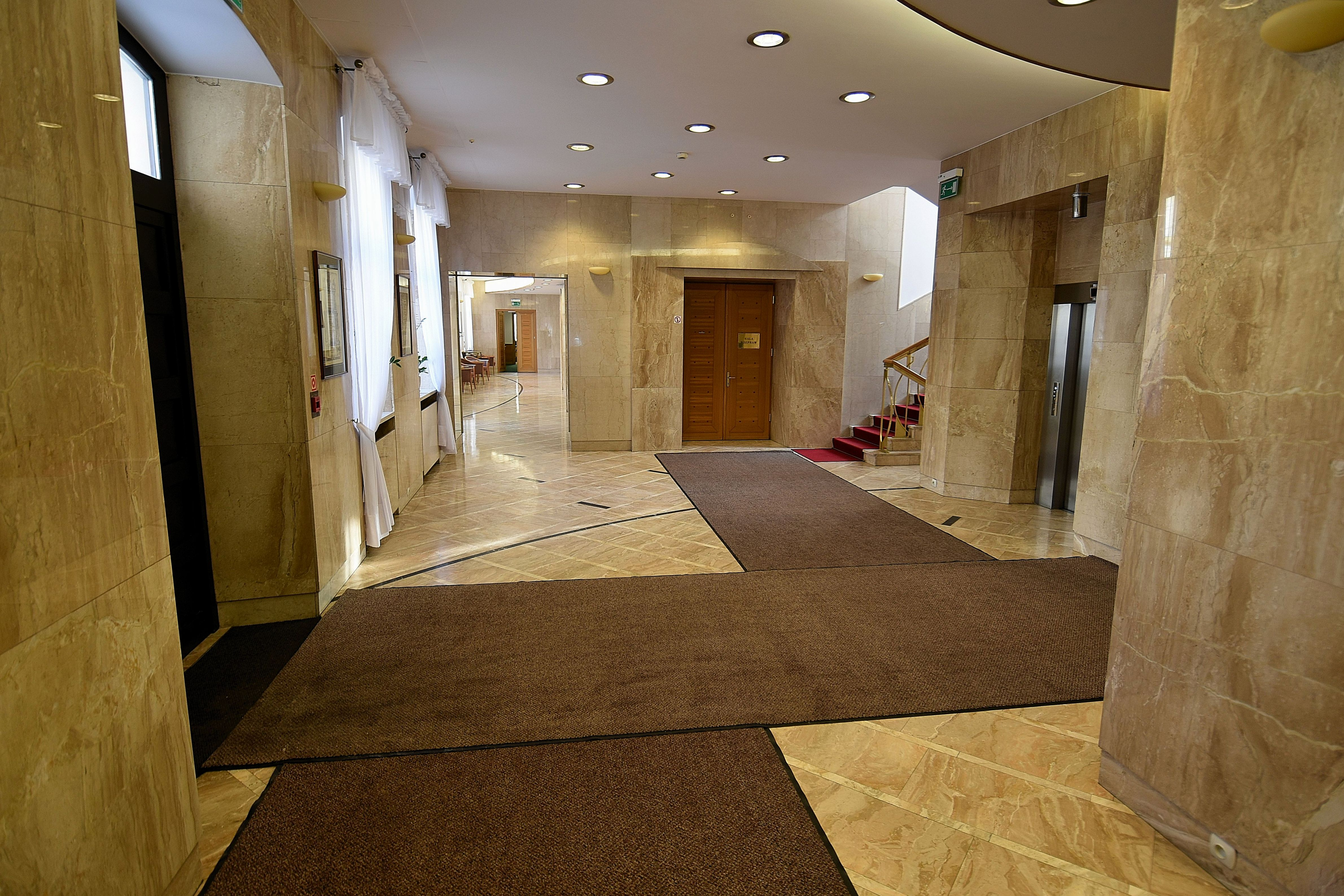 Parter budynku Trybunału Konstytucyjnego z widocznym wejściem do małej sali rozpraw